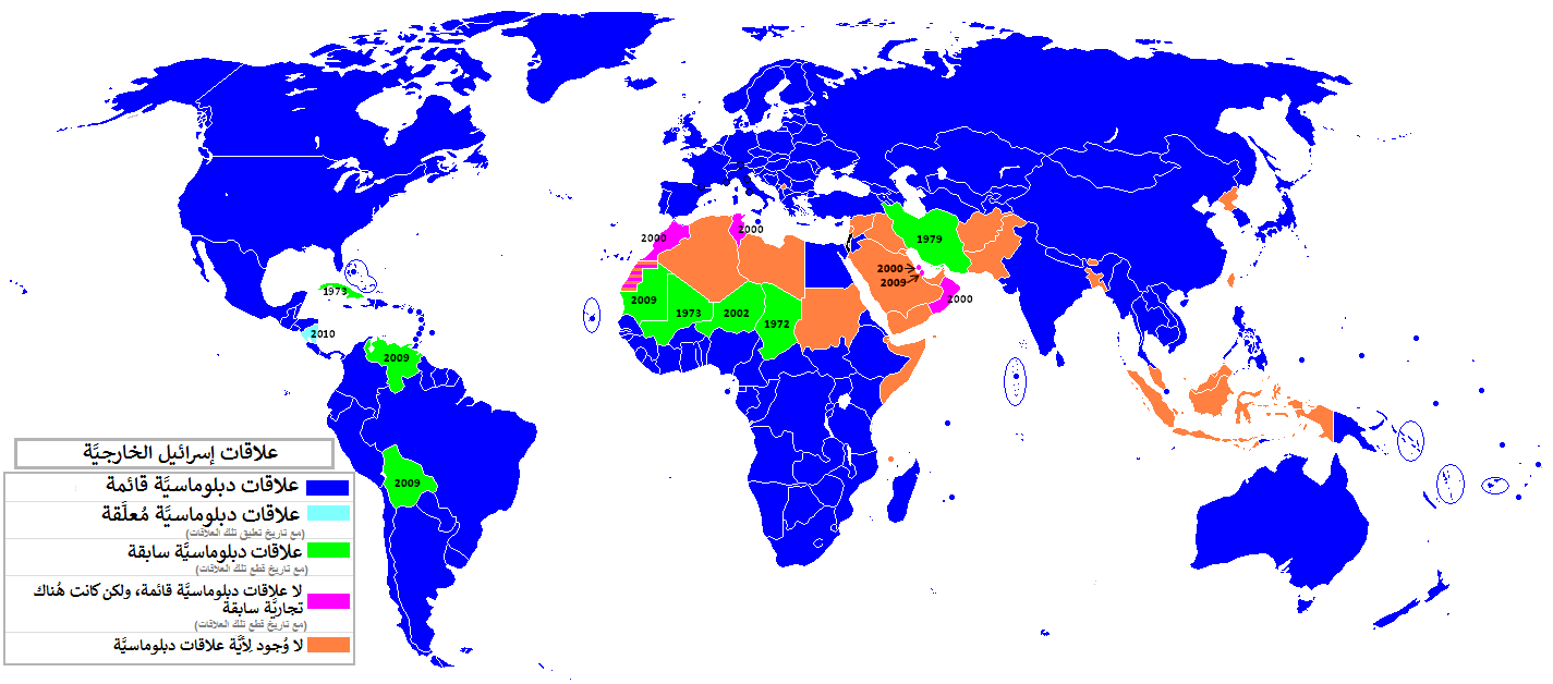 خريطة العالم تُظهر أوضاع العلاقات الدبلوماسيَّة مع إسرائيل، وُصولًا إلى شهر تمُّوز (يوليو) 2011م.